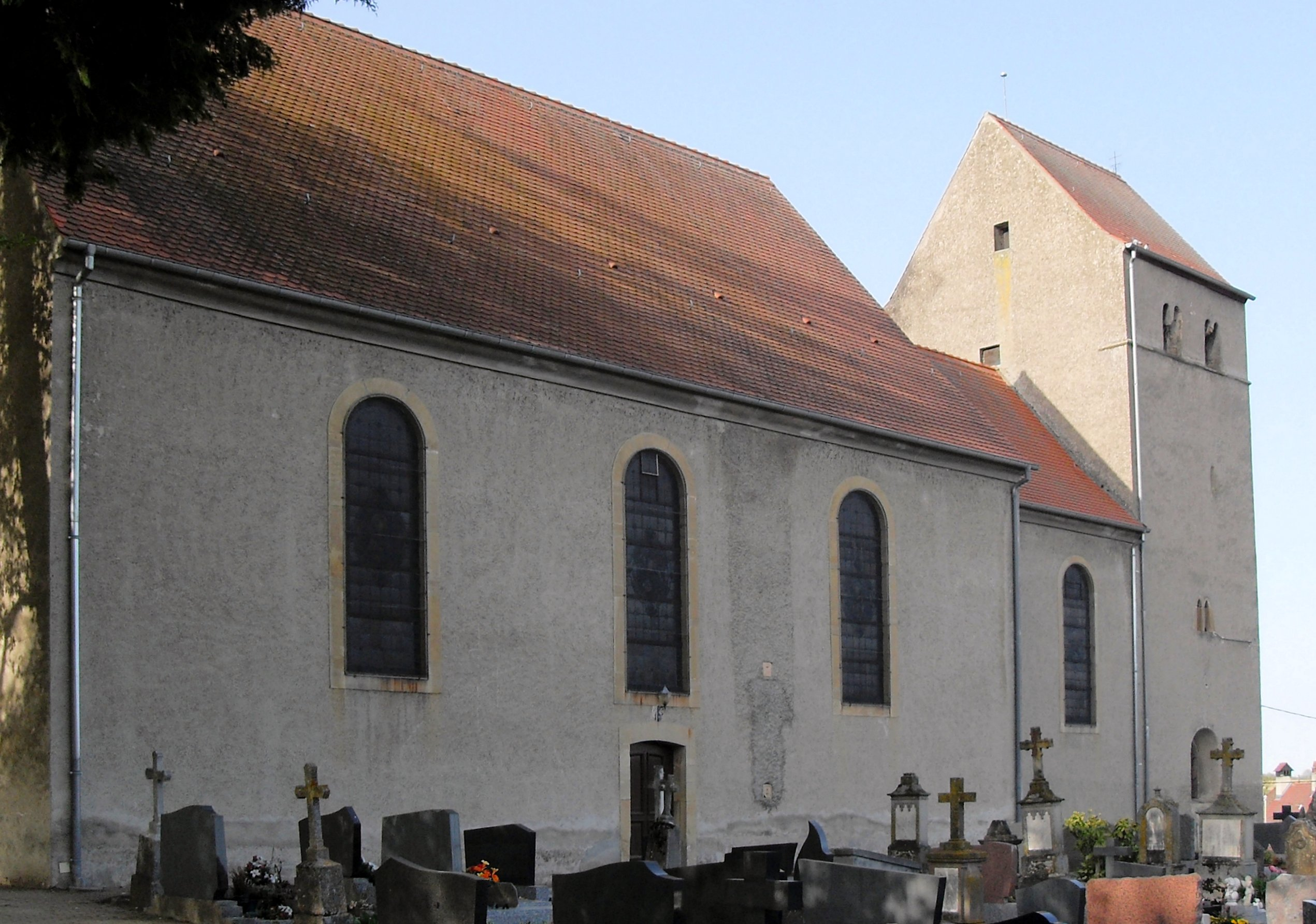 L'église Saint-Sébastien d'Obermorschwiller